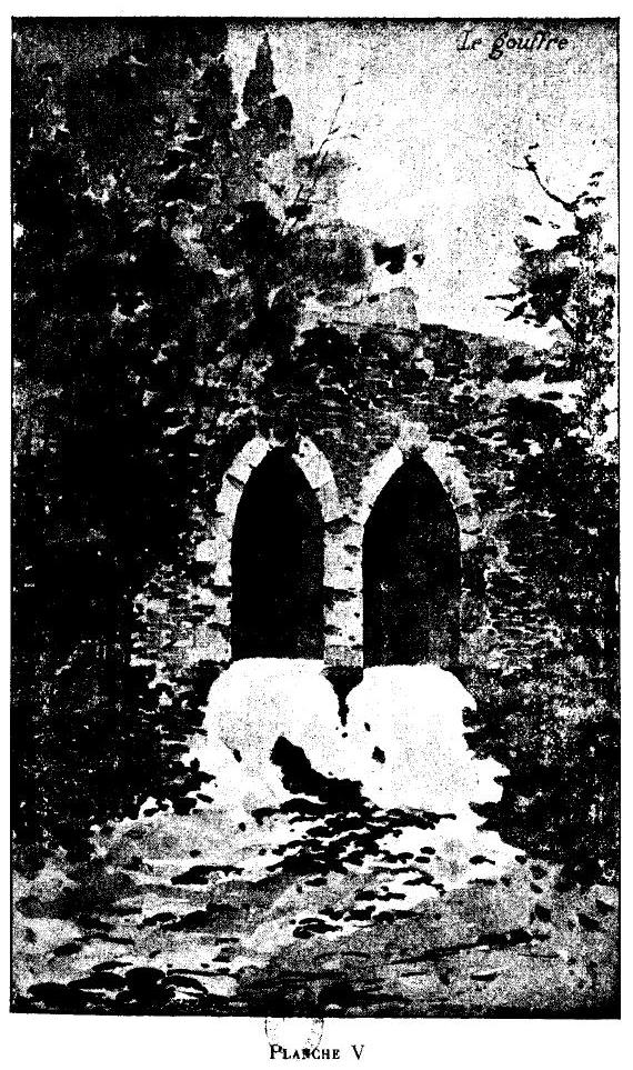 Le Donjon de Courmenant, ses origines, ses seigneurs et possesseurs, son musée